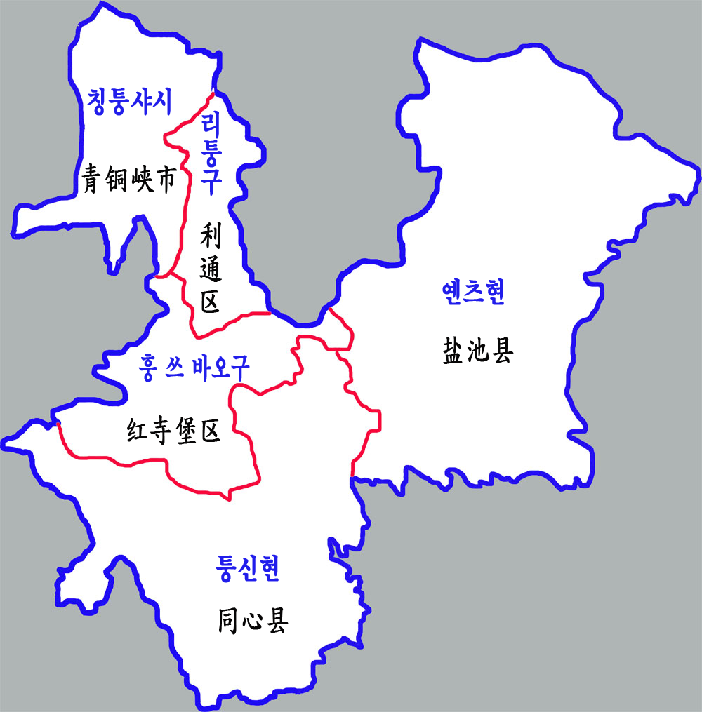 우중시 현급구역